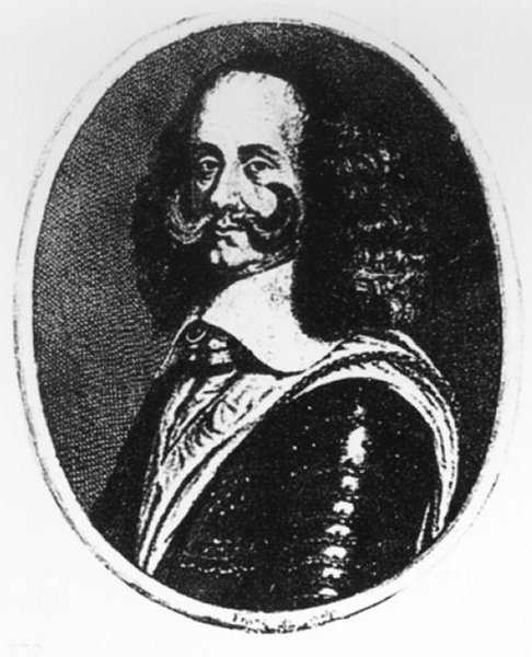 Retrato de Josep Margarit (1602-1685), militar catalán.